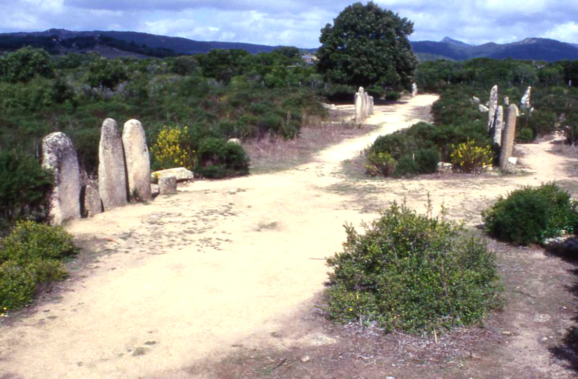 Palaggiu